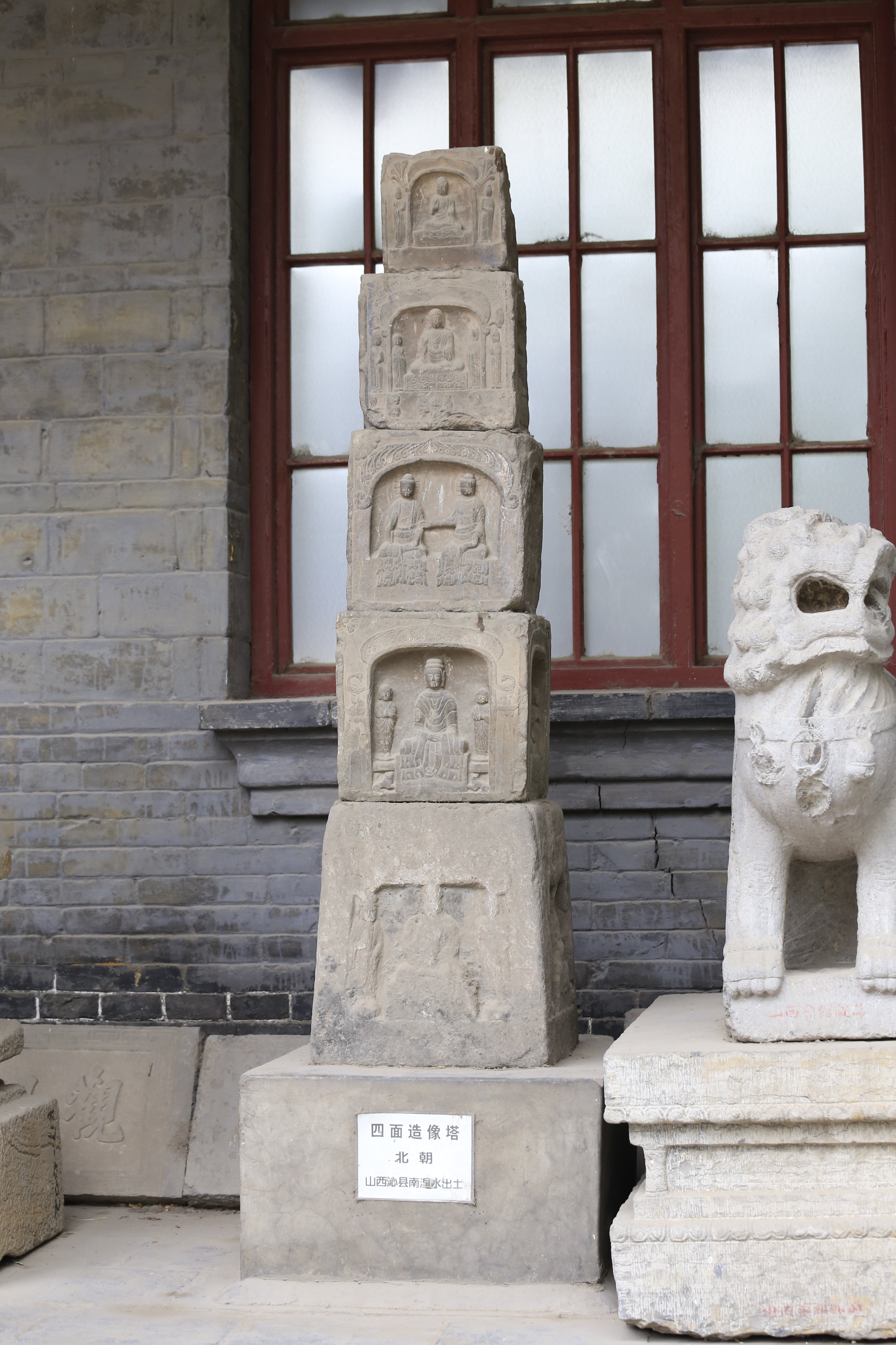 太原府文庙（山西省民俗博物馆）—— 石雕